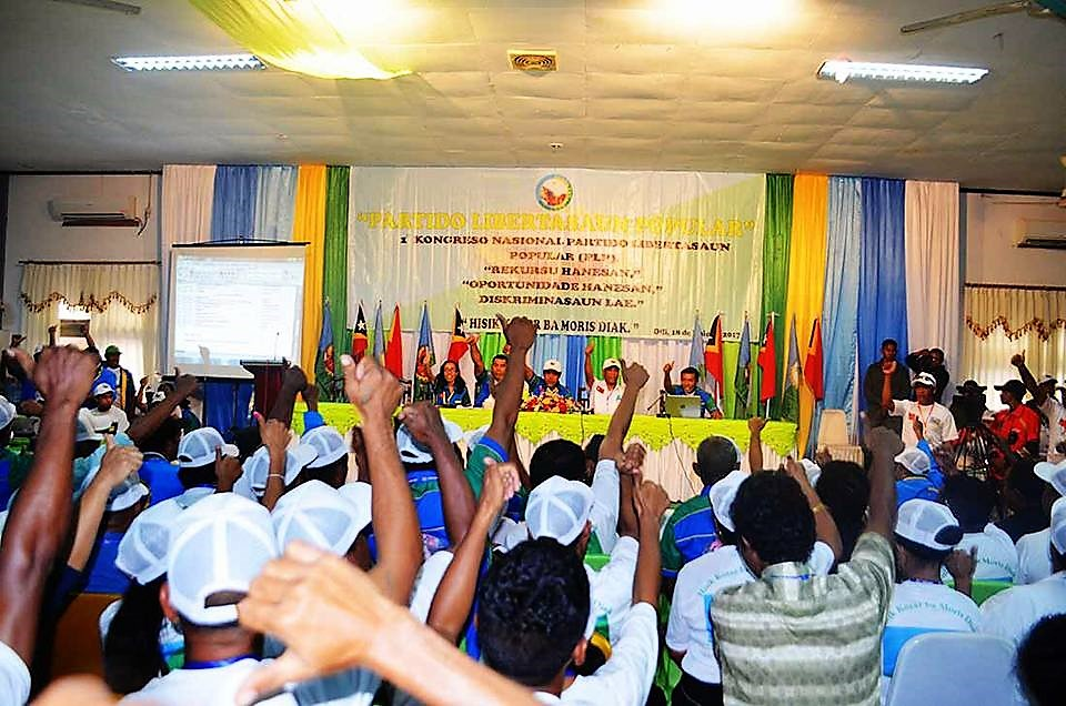 Erster Nationalkongress der PLP, Osttimor